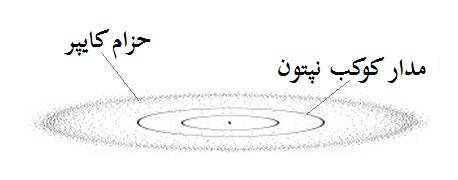 رسمٌ بيانيّ يُظهرُ حزام كايپر ومدار كوكب نپتون.